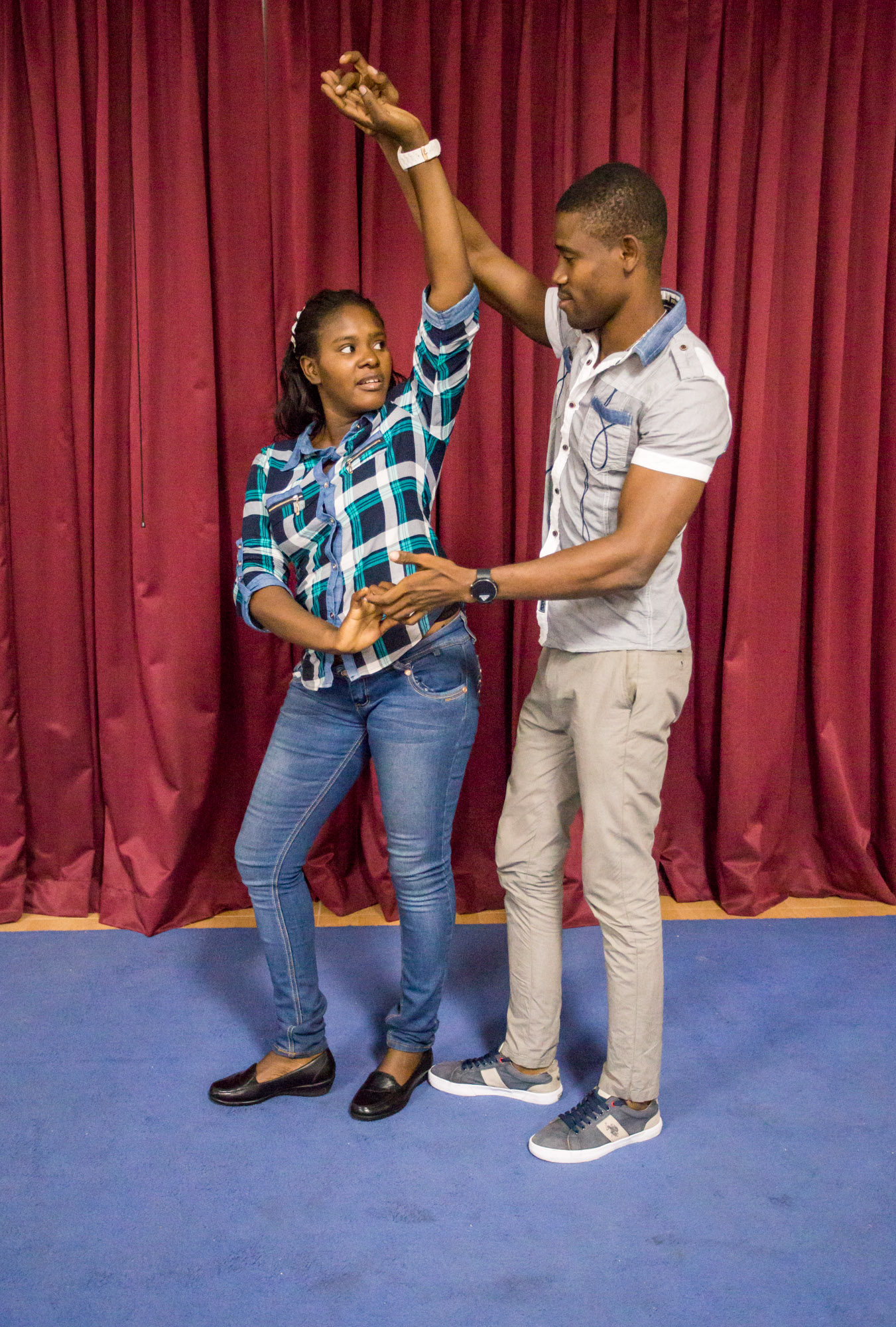 Mouvement de danse compas.